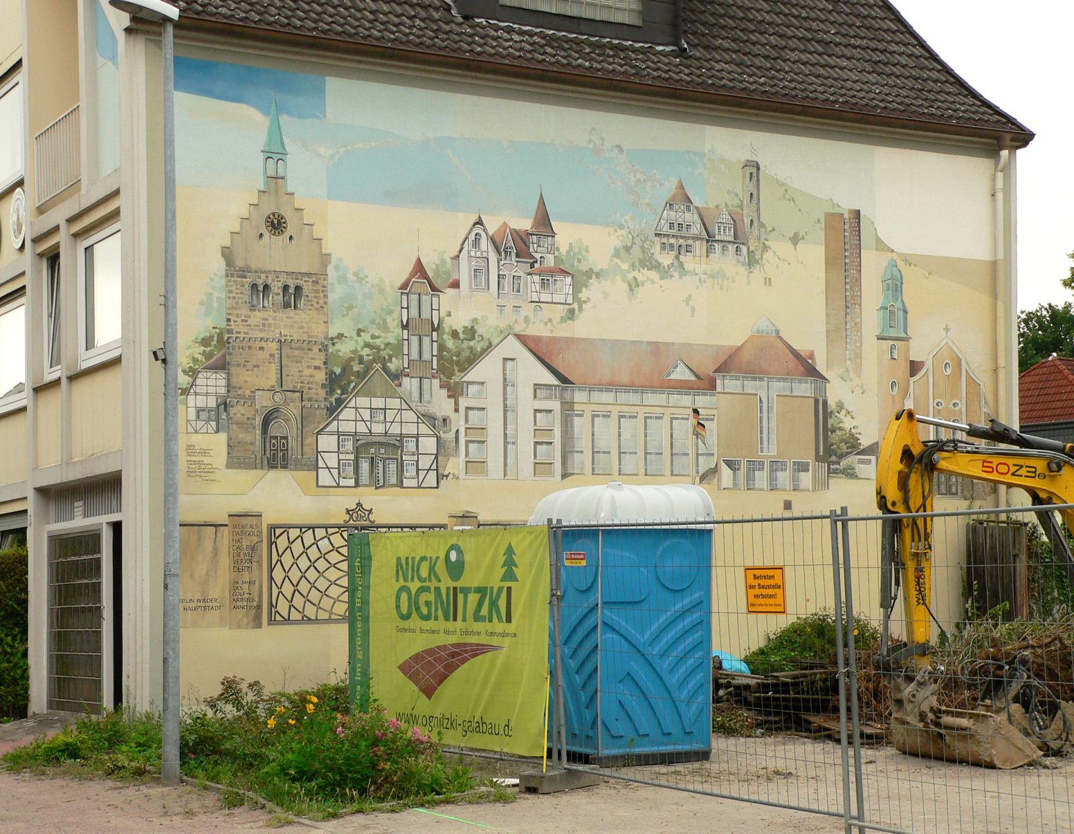 Gebäudewand in Gehrden mit Szenen aus Stadtbild, laut Beschriftung ausgeführt im Juli 1991